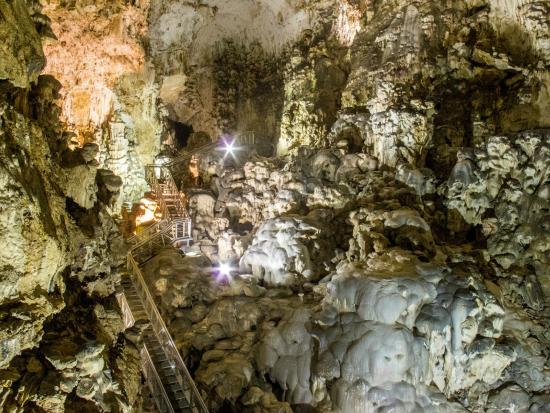 Grotta di Monte Cucco turistica, Sala Margherita